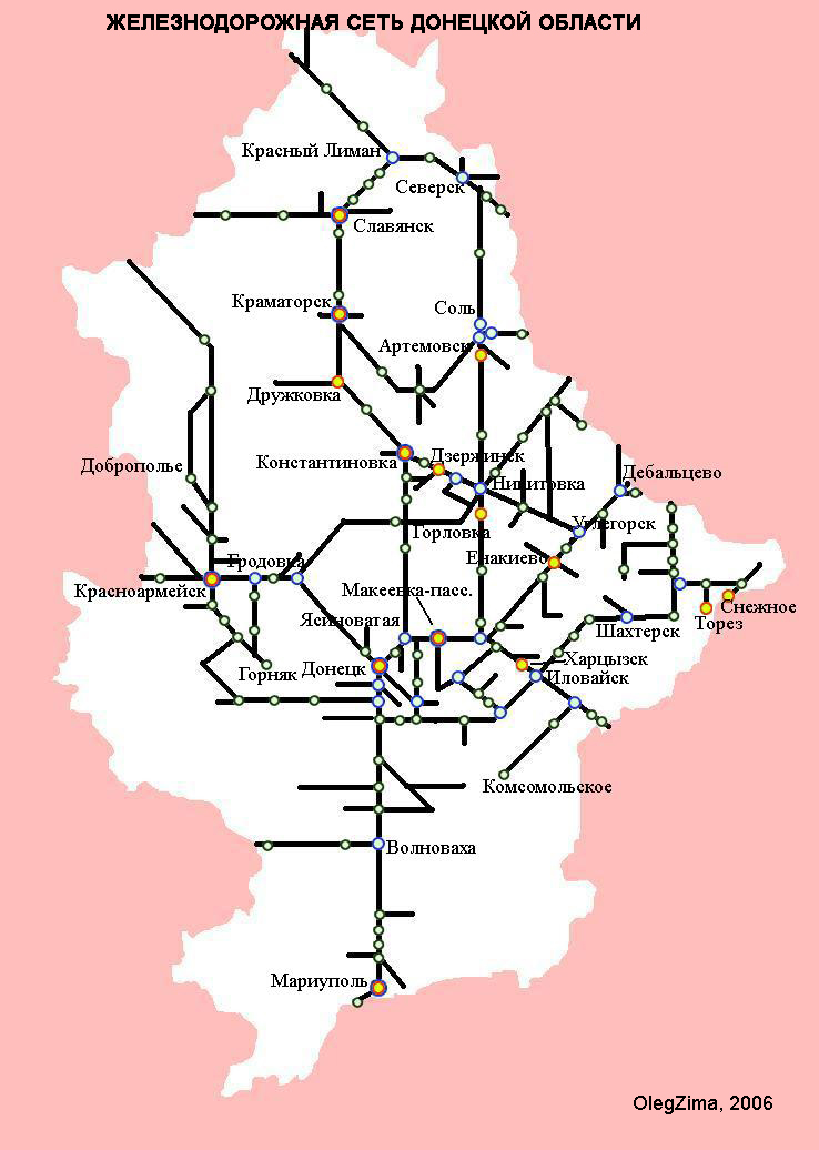 map